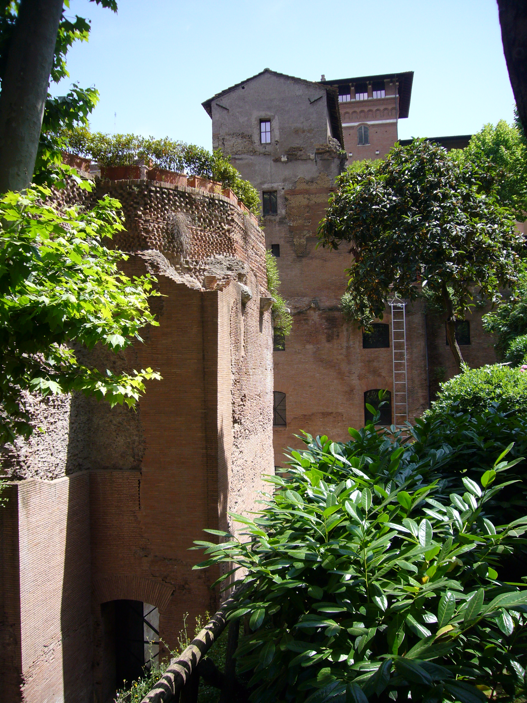 Roma, Horti Sallustiani, vista d'insieme del lato destro (aula, cortile, edificio a destra)